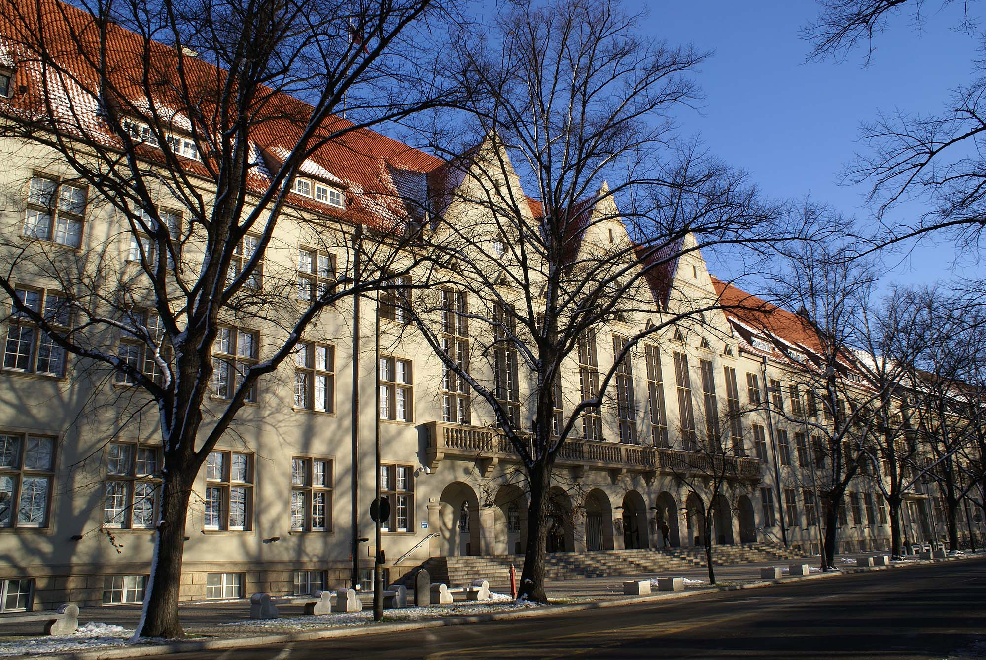 Wrocław, zespół Politechniki Wrocławskiej, 1905-1911, 1935